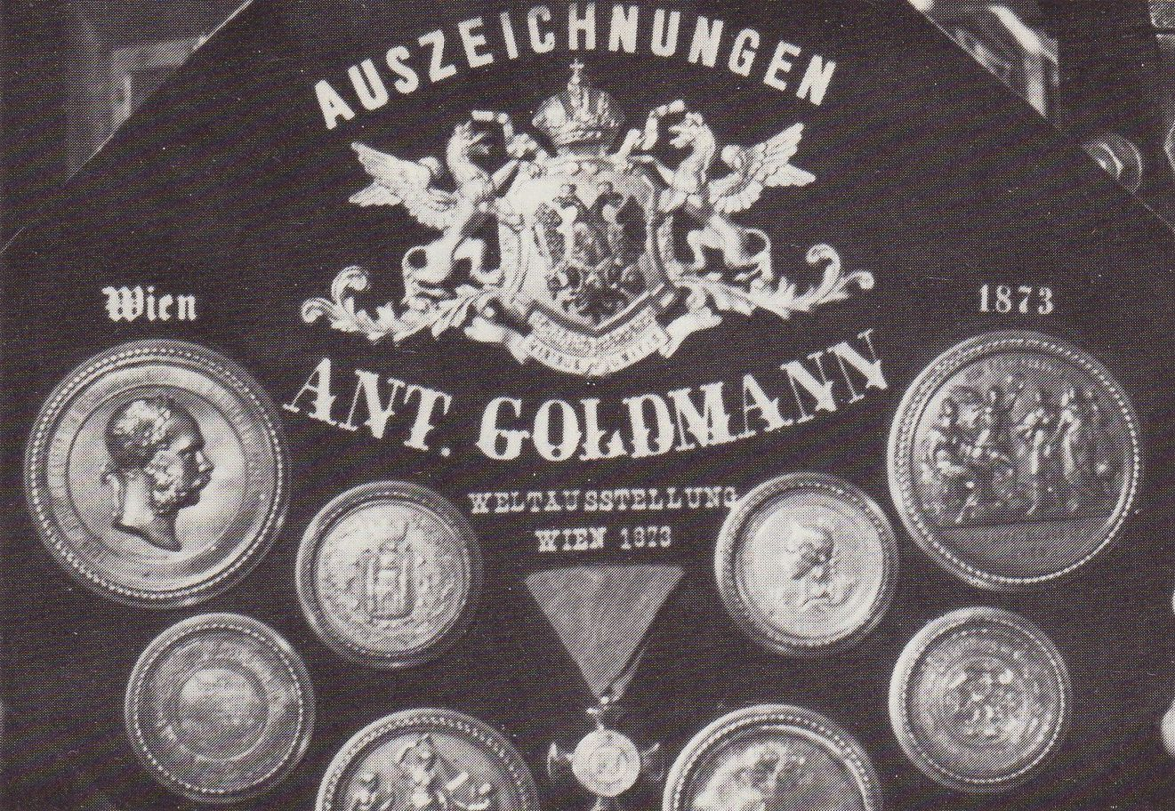 Ein Teil der Auszeichnungen von Anton Goldmann